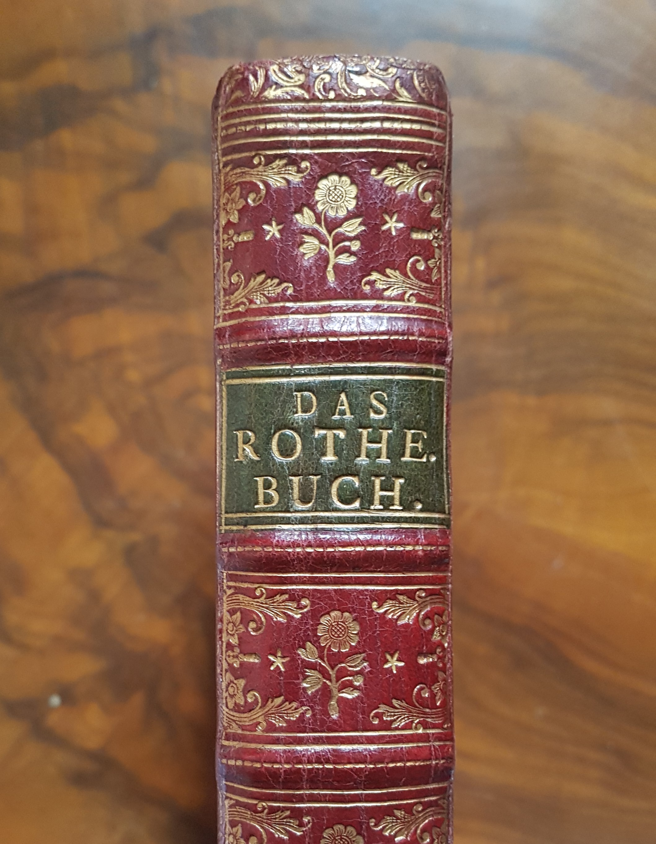 Das Rothe Buch, Buchrücken